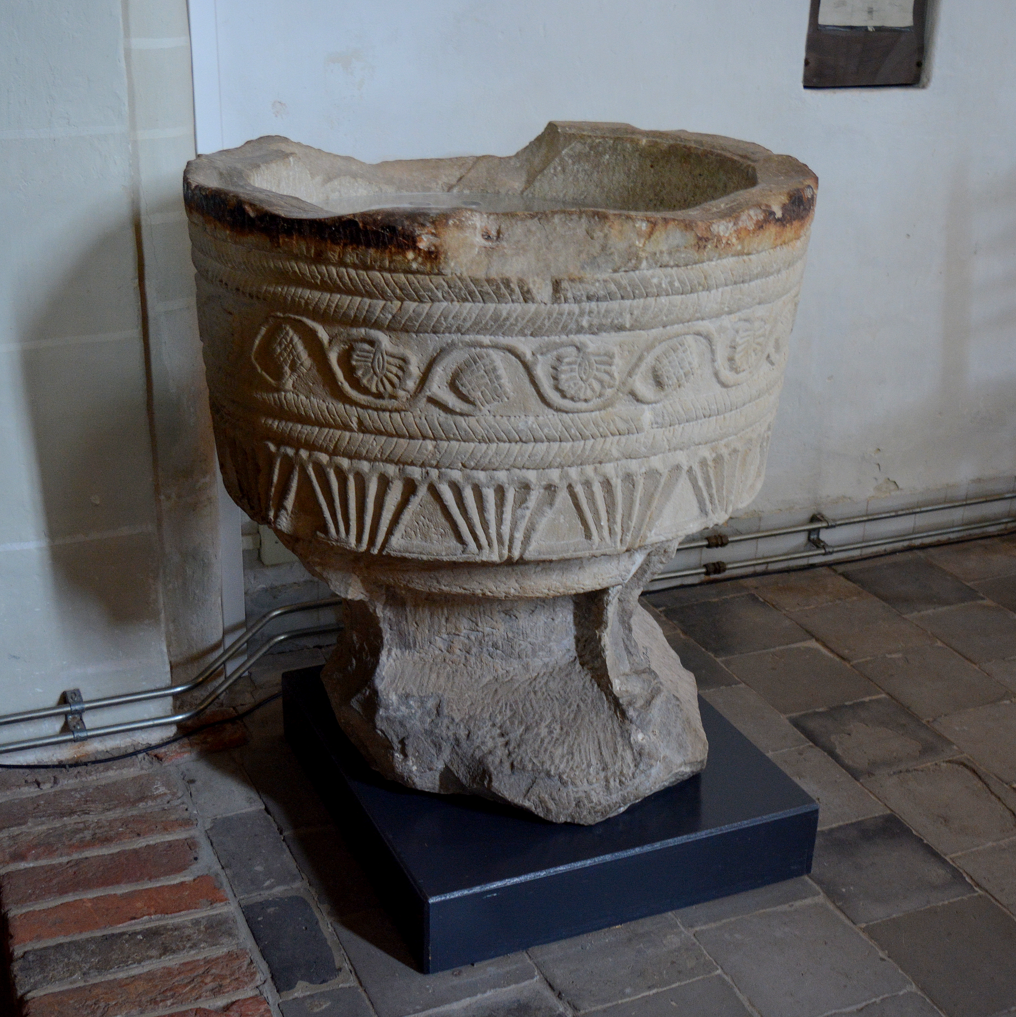 Sint-Margaretakerk (Norg), doopvont